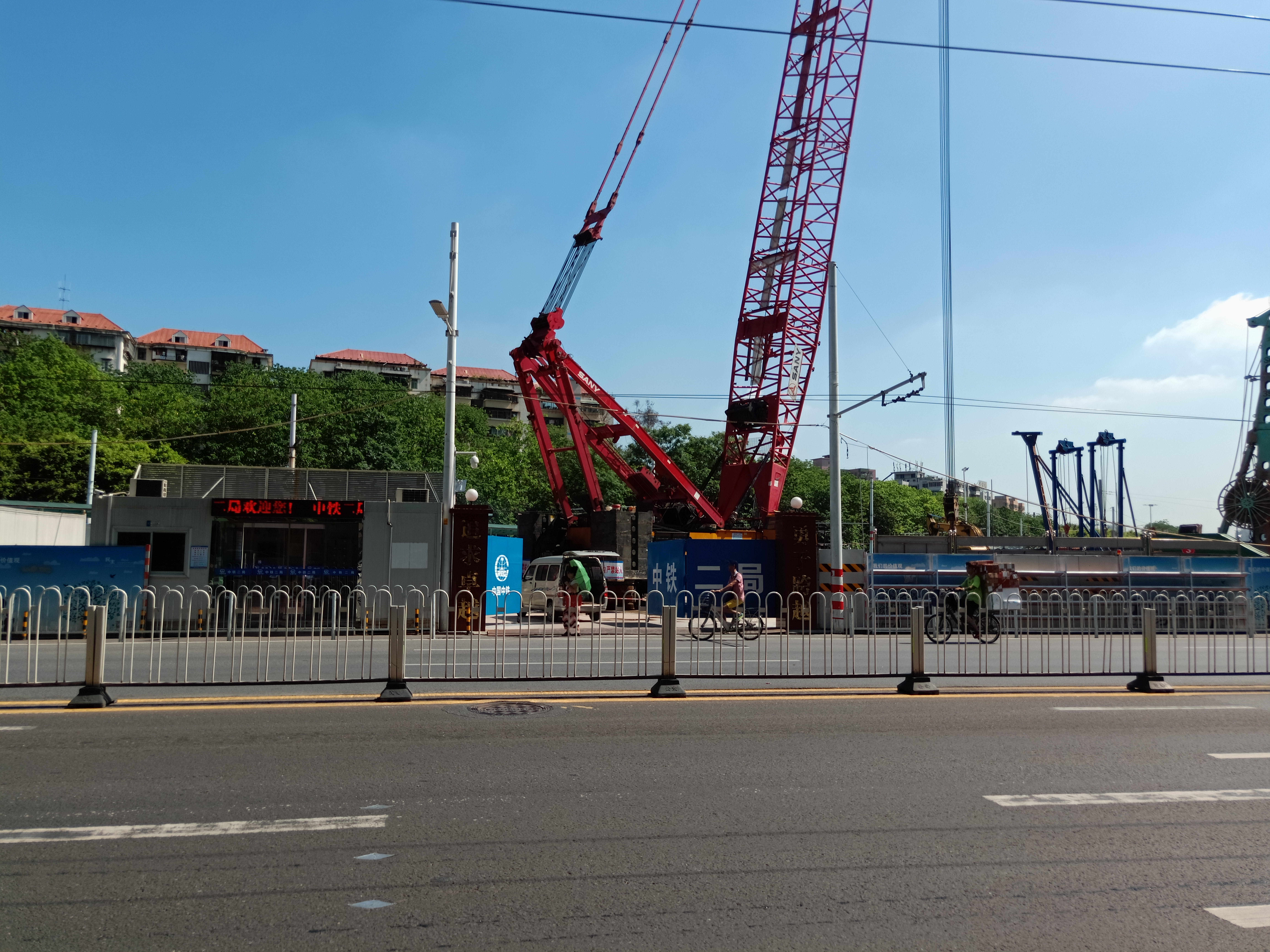 粵語: 2018年5月28號，11號綫中山八站重喺度起緊。